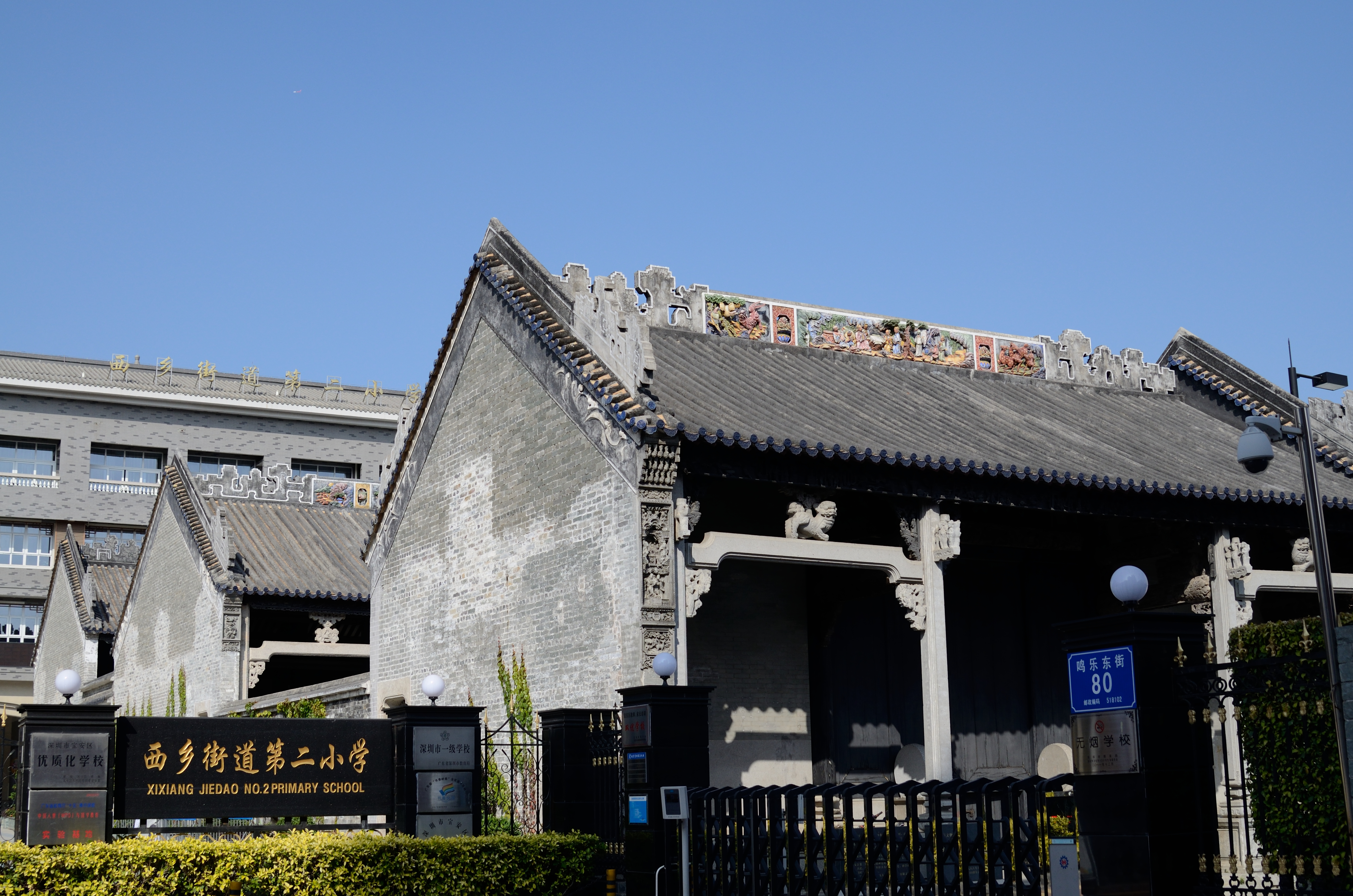 攝於中國廣東省深圳市西鄉鎮樂群村